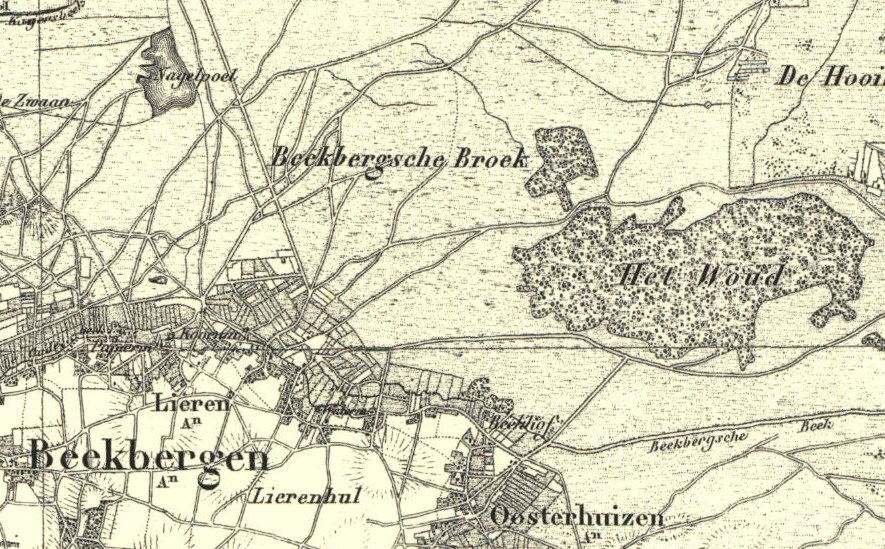 Beekbergen, het Beekbergerwoud en het Beekbergerbroek op een kaart van Kuijper uit 1866 gepubliceerd op Veluweopdekaart.nl